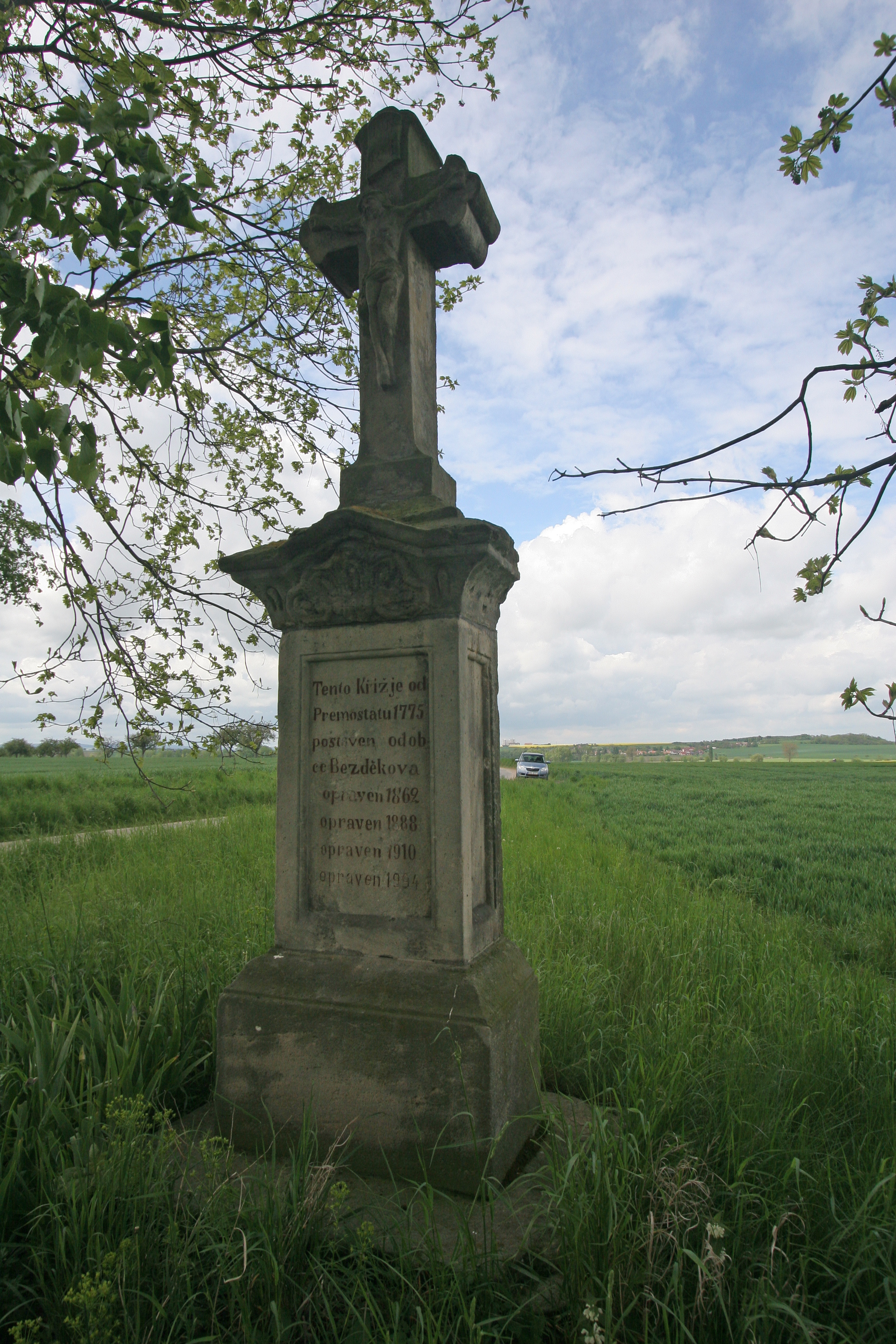 Krucifix (Dolní Bezděkov), při silnici z Kočí vlevo směrem do Bezděkova, Dolní Bezděkov